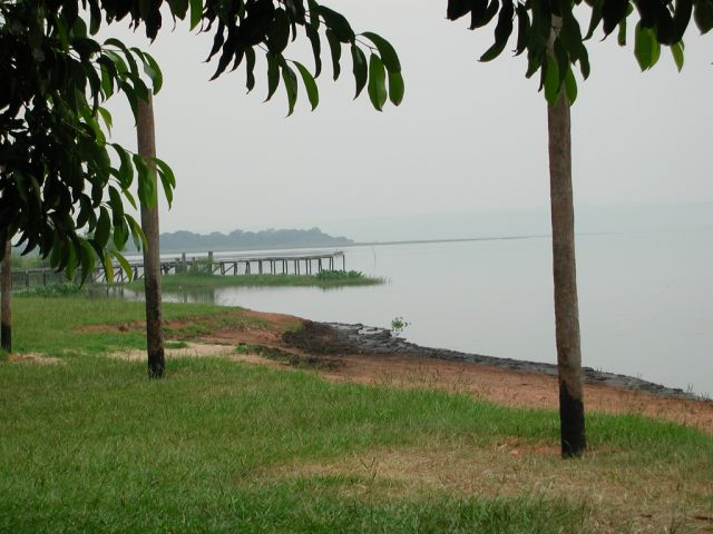 Lago